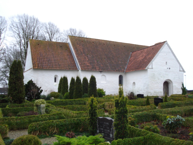 Hvilsted Church at Århus, Denmark